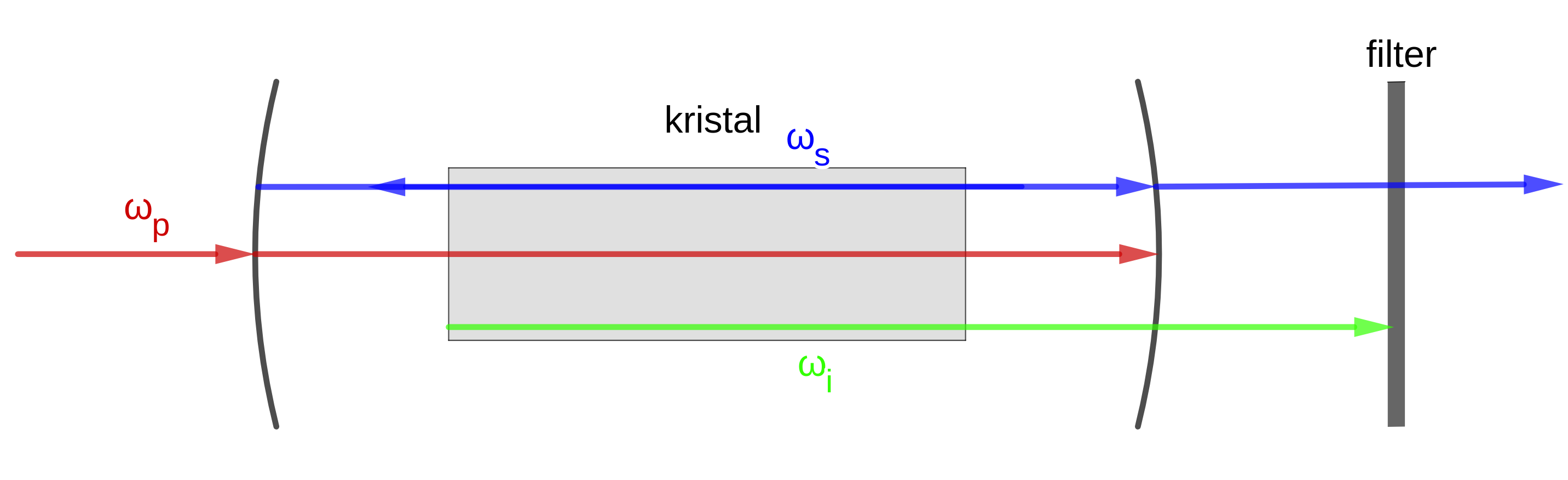 Optično parametrični oscilator. Sistem je postavljen v resonator, da se signal večkrat ojača.